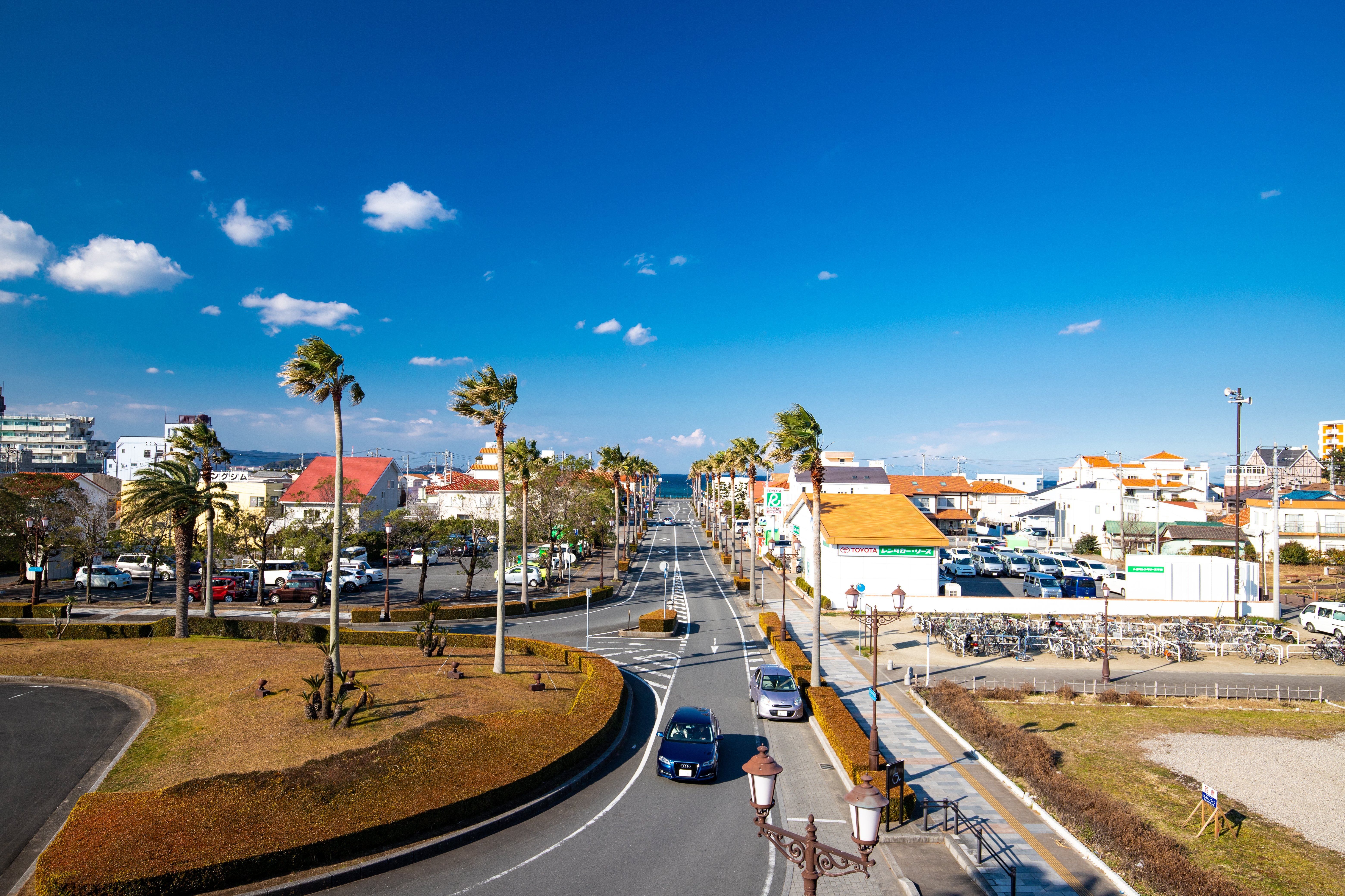 千葉県館山市、館山駅